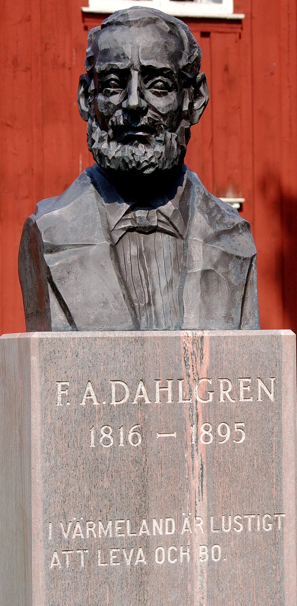 Byst av Fredrik August Dahlgren placerad på hembygdsgården i Ransäter, Värmland, Sverige.